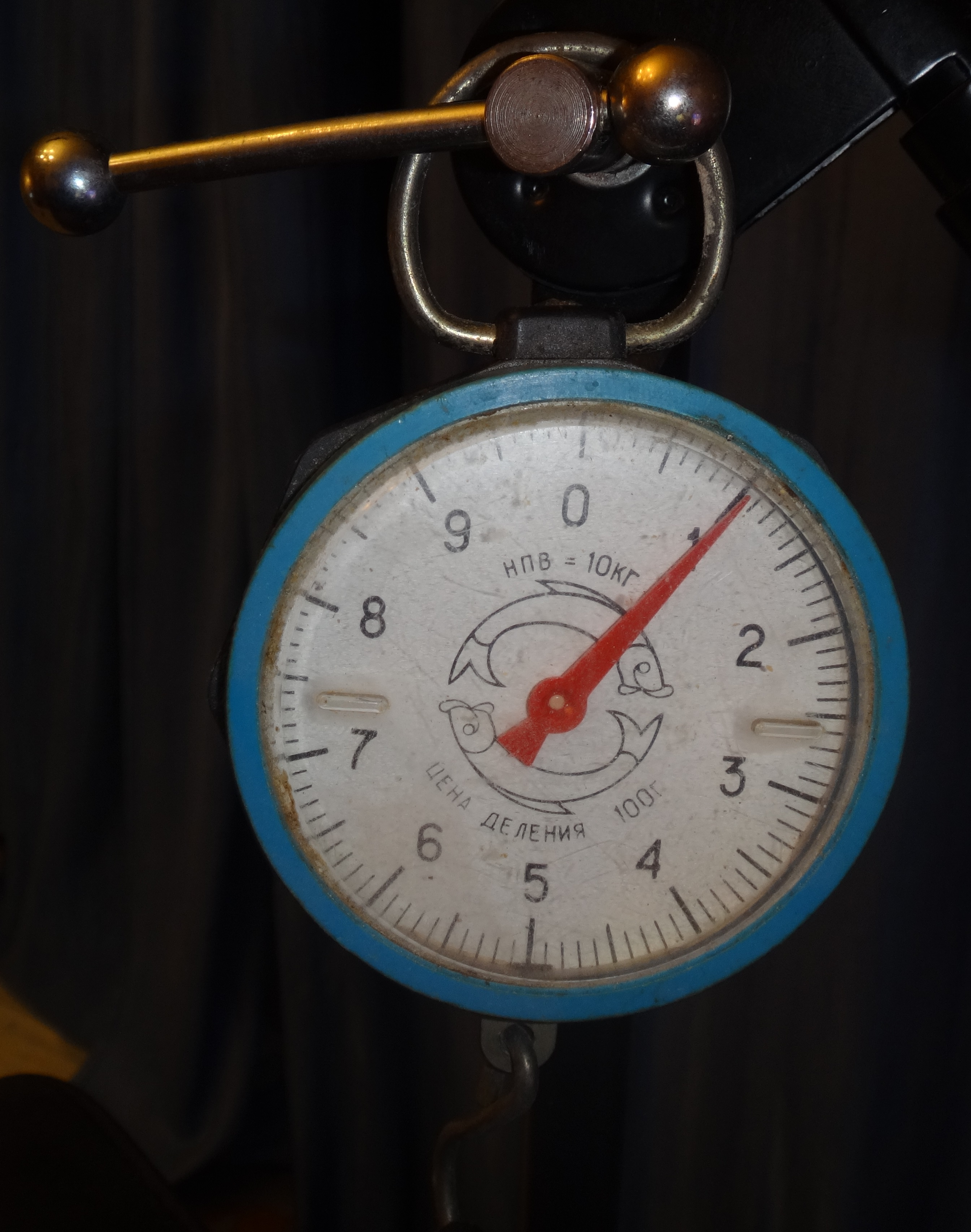 Стрелочные рычажные весы